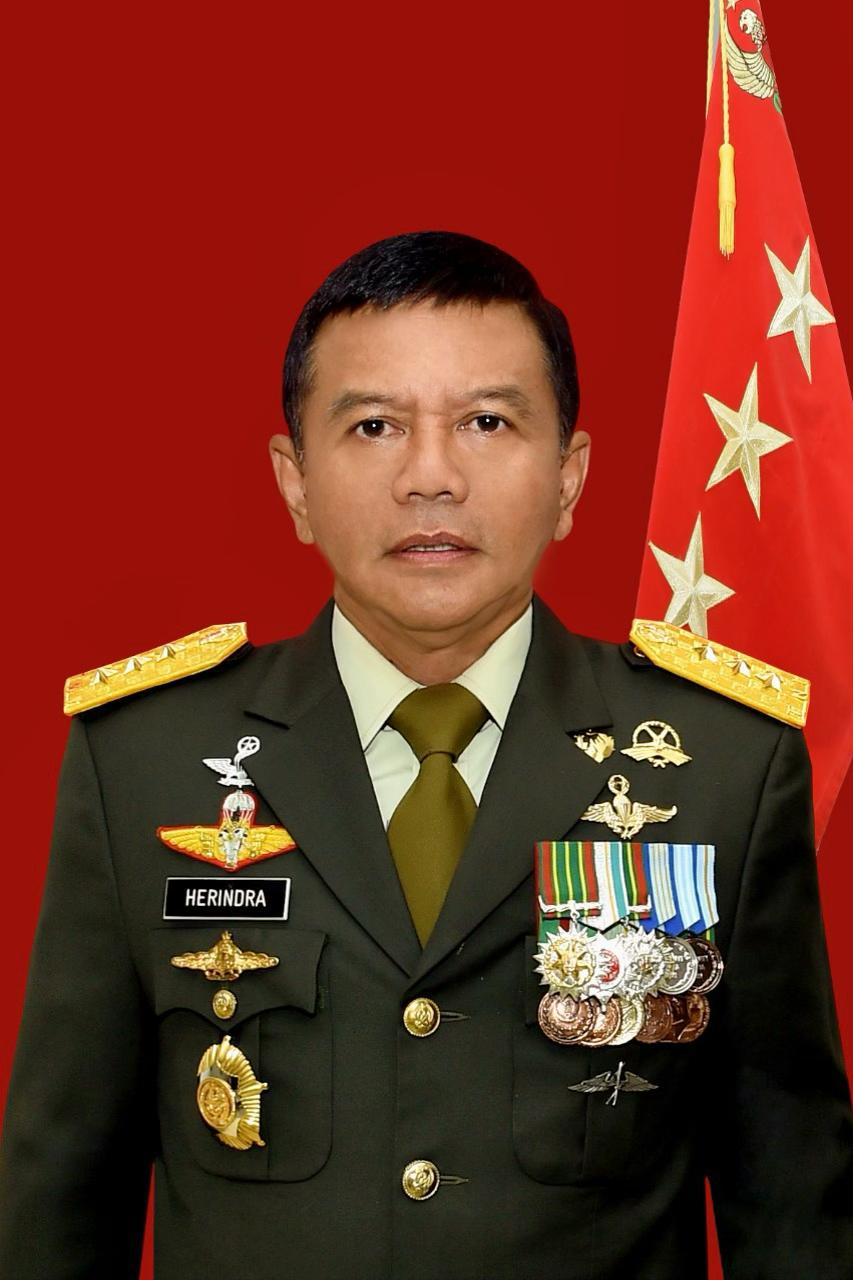 Foto Irjen TNI